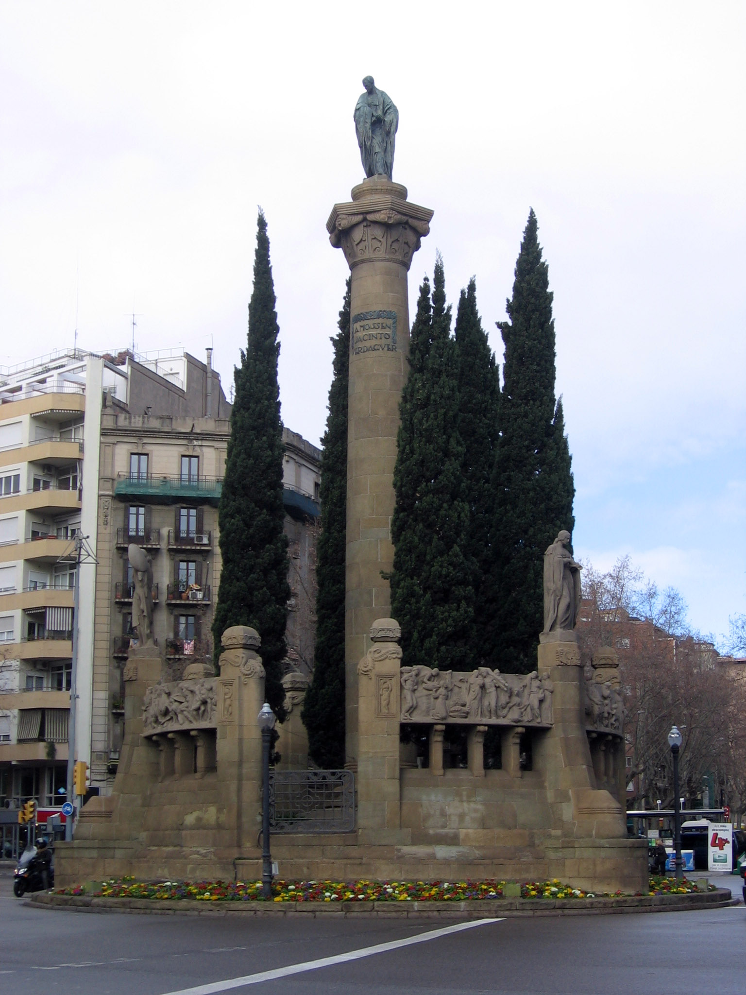 Monumento a Jacint Verdaguer (Barcelona).